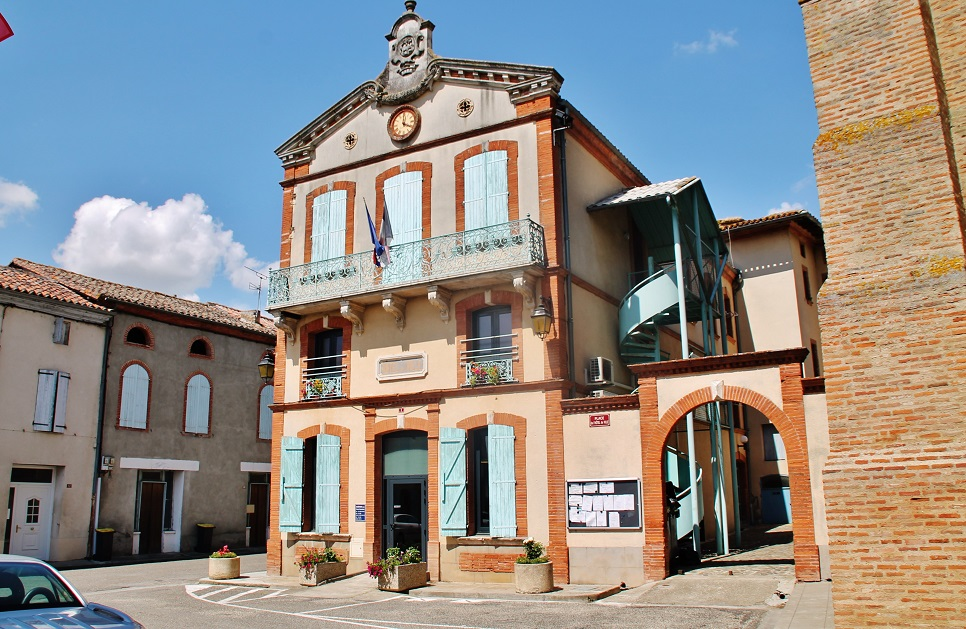 La Mairie